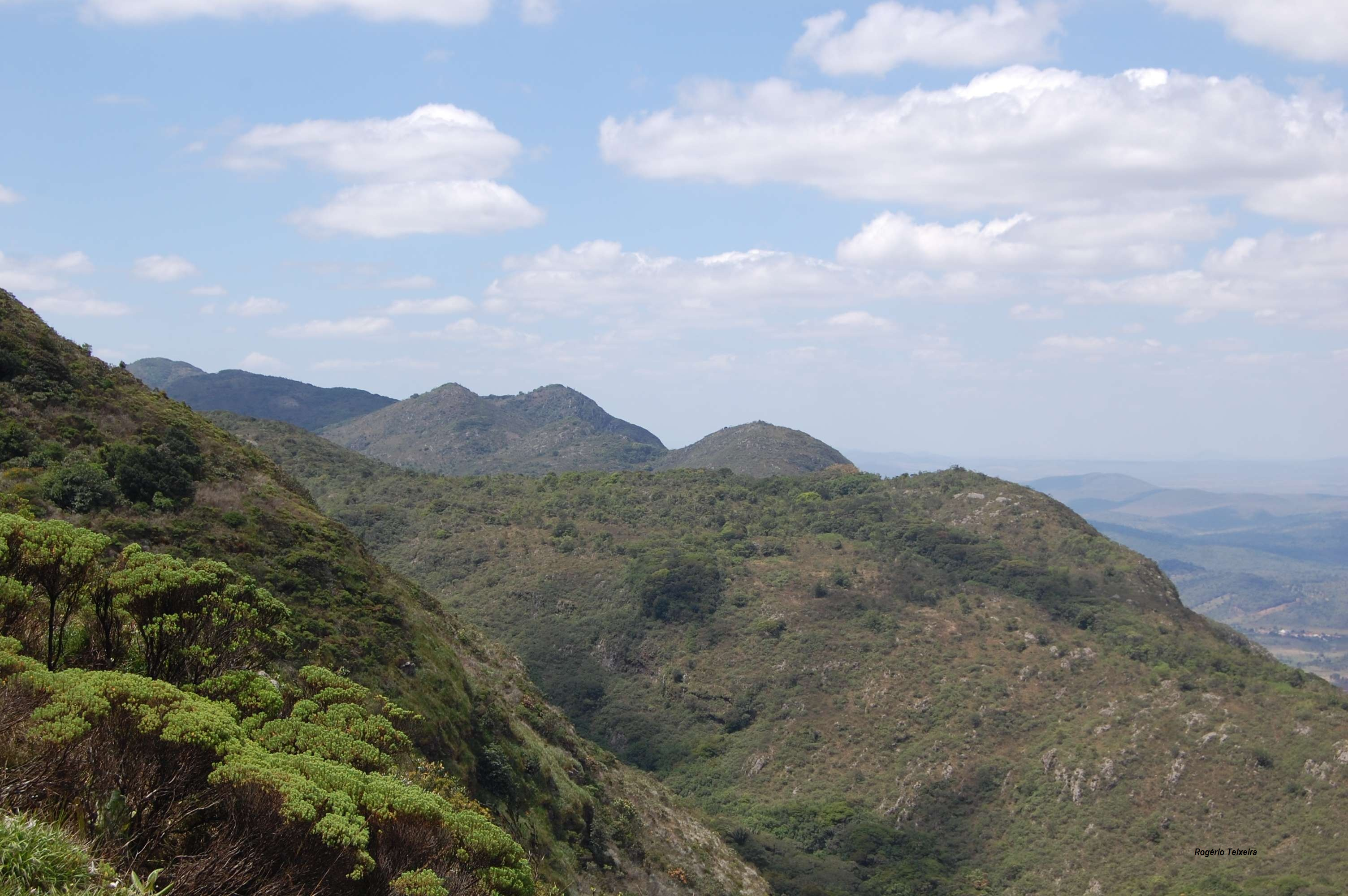 A belíssimas paisagens de serras e vales.